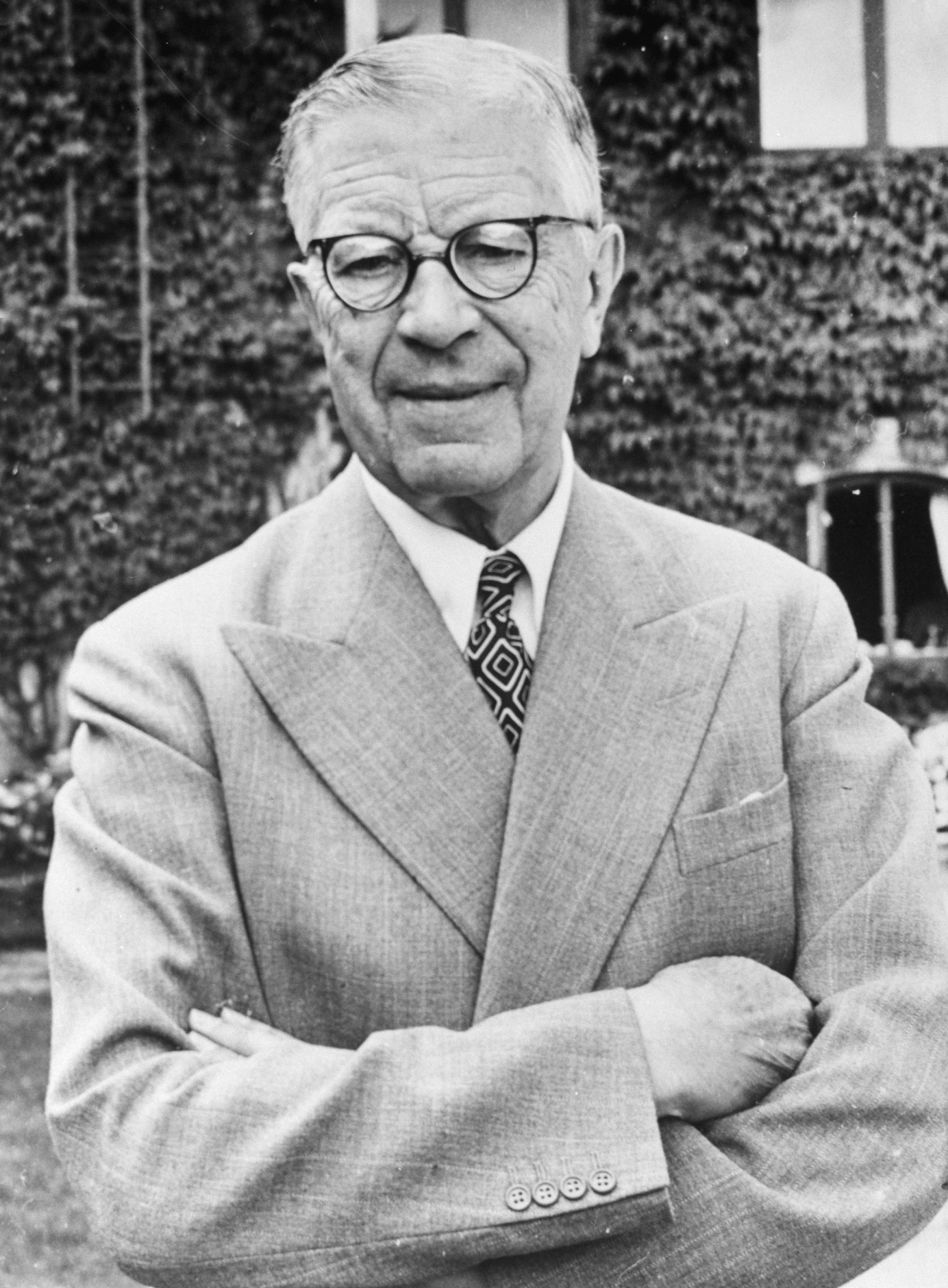 Koning Gustav Adolf 80 jaar op 11 november